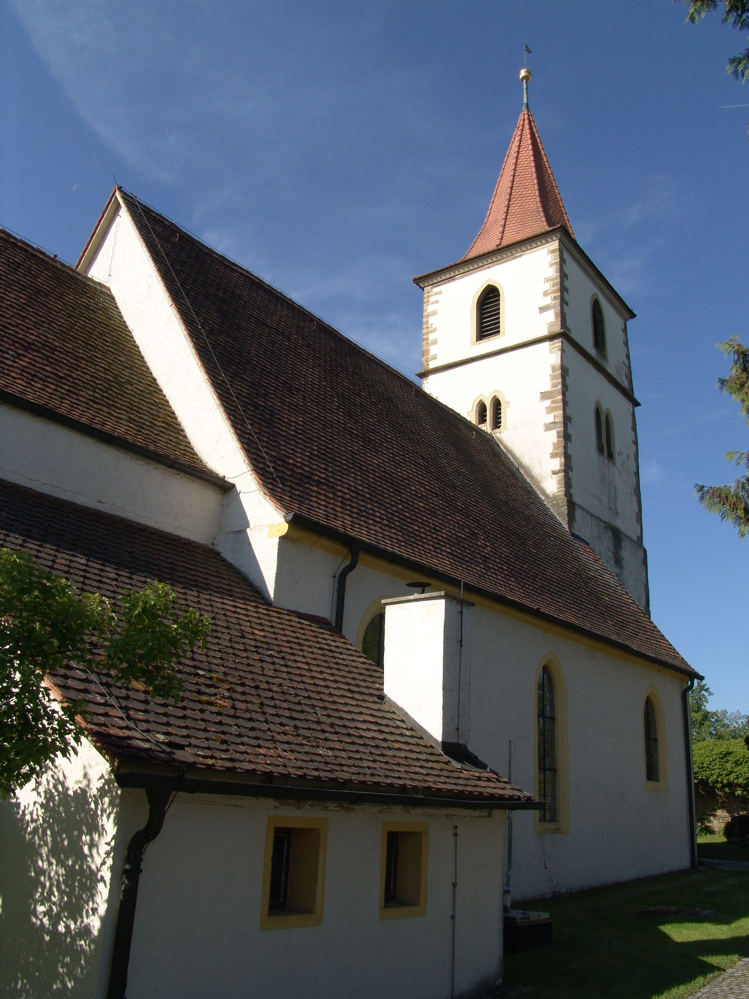 evang.-luth Kirche St. Maria in Steinach an der Ens